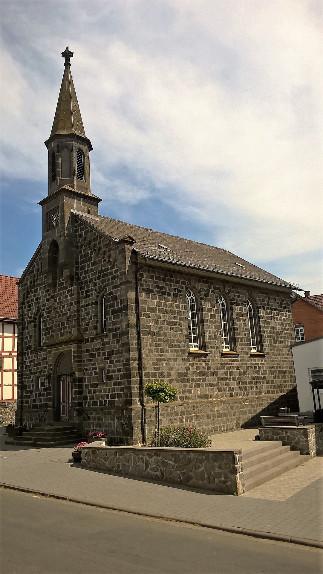 Evangelische Kirche Weitershain, Grünberg, Landkreis Gießen, Hessen, Deutschland